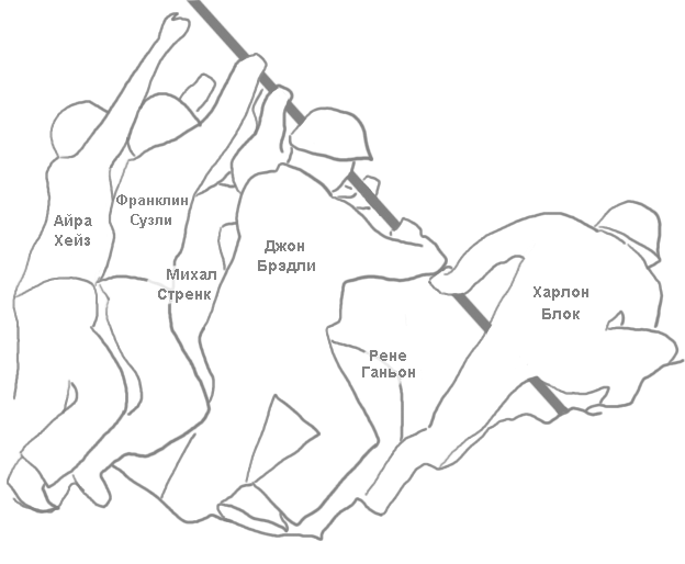 Русифицированная версия эскиза "Подъём флага на горе Сурибати".